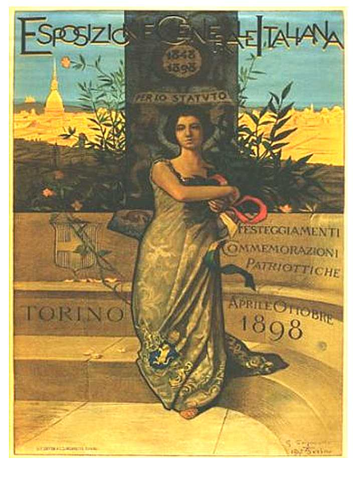 Manifesto della Esposizione generale italiana del 1898 a Torino